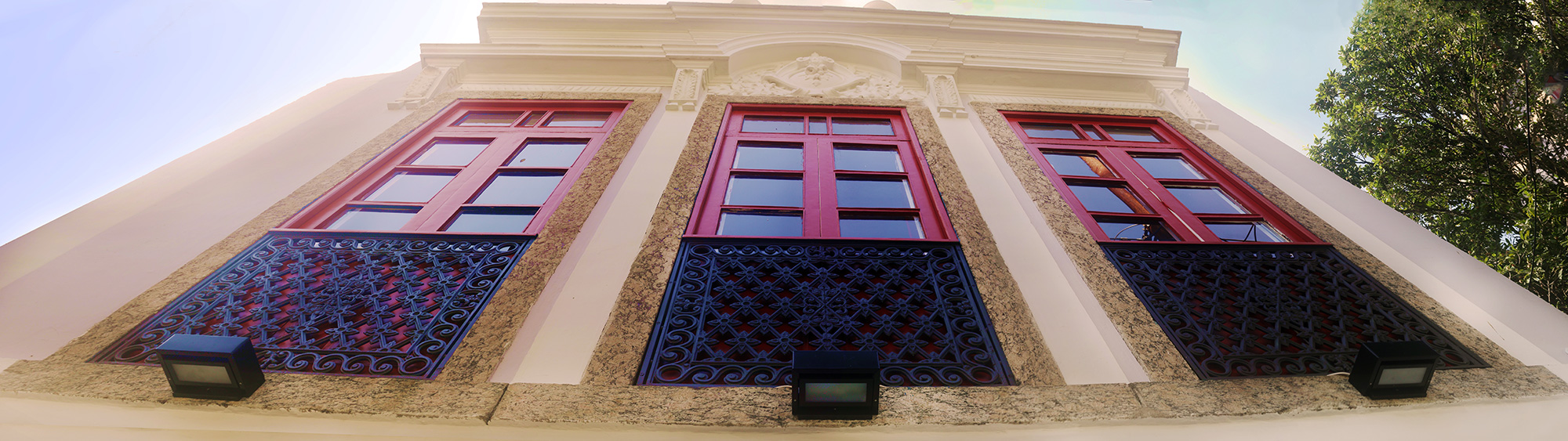 Sede da Academia Internacional de Cinema (AIC) - Rio de Janeiro RJ